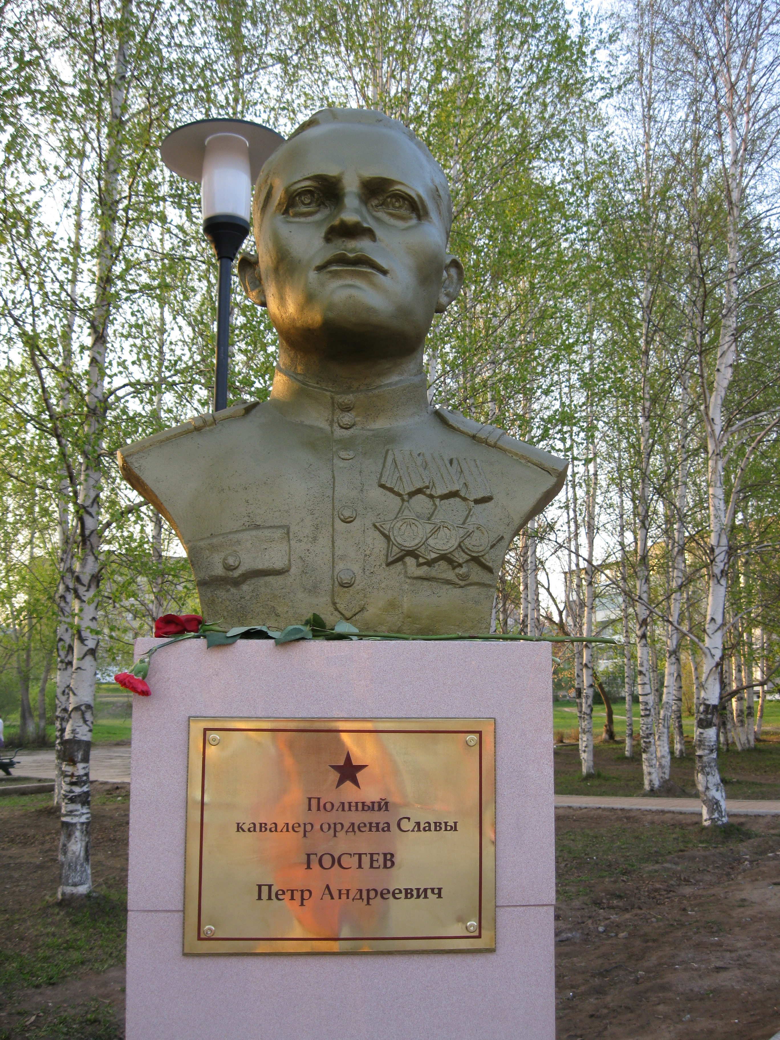 Бюст Петра Андреевича Гостева на Аллее Славы, открытой 09.05.2010 года в городе Чернушка.